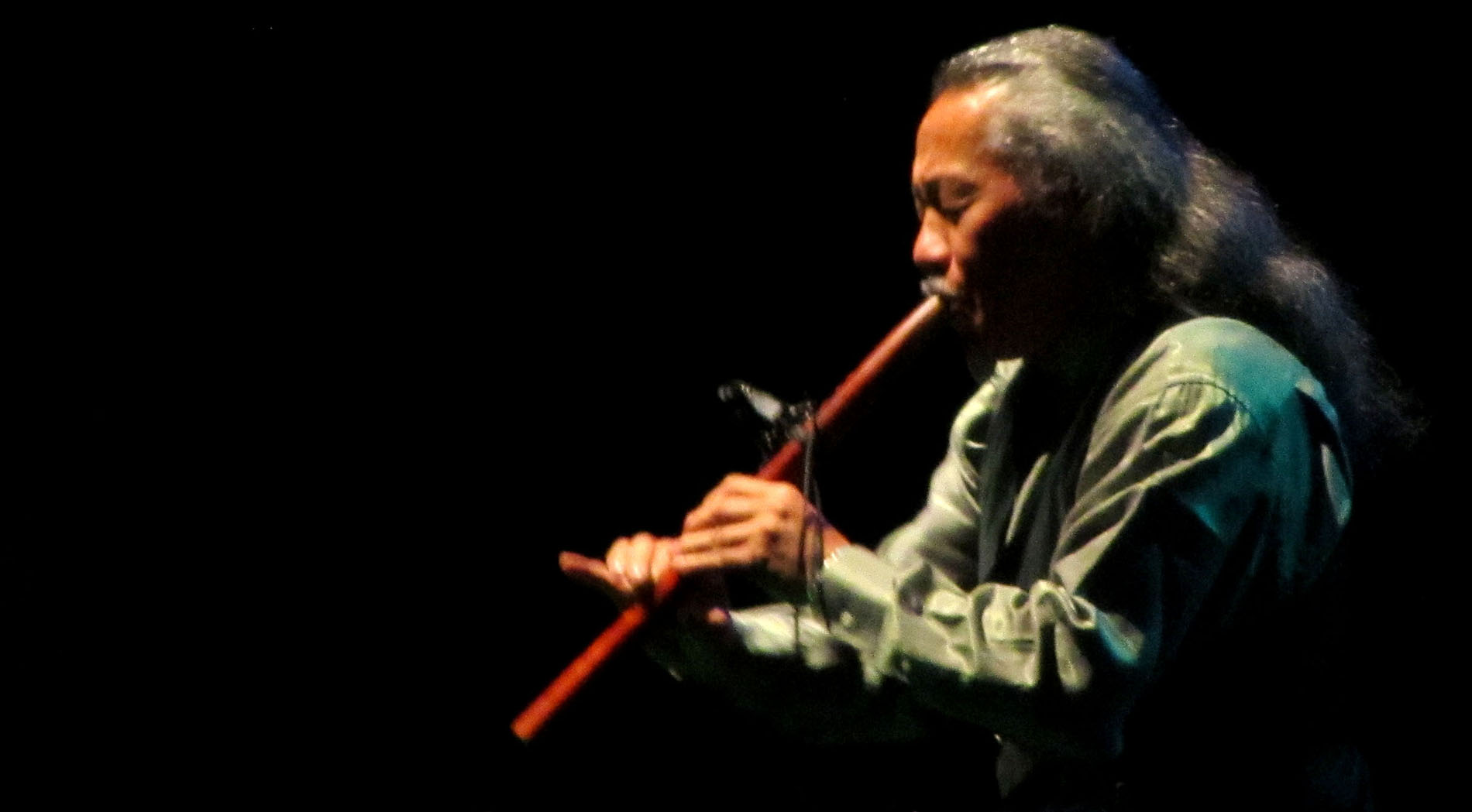 Kitaro concert at Tehran, Iran Oct 2014